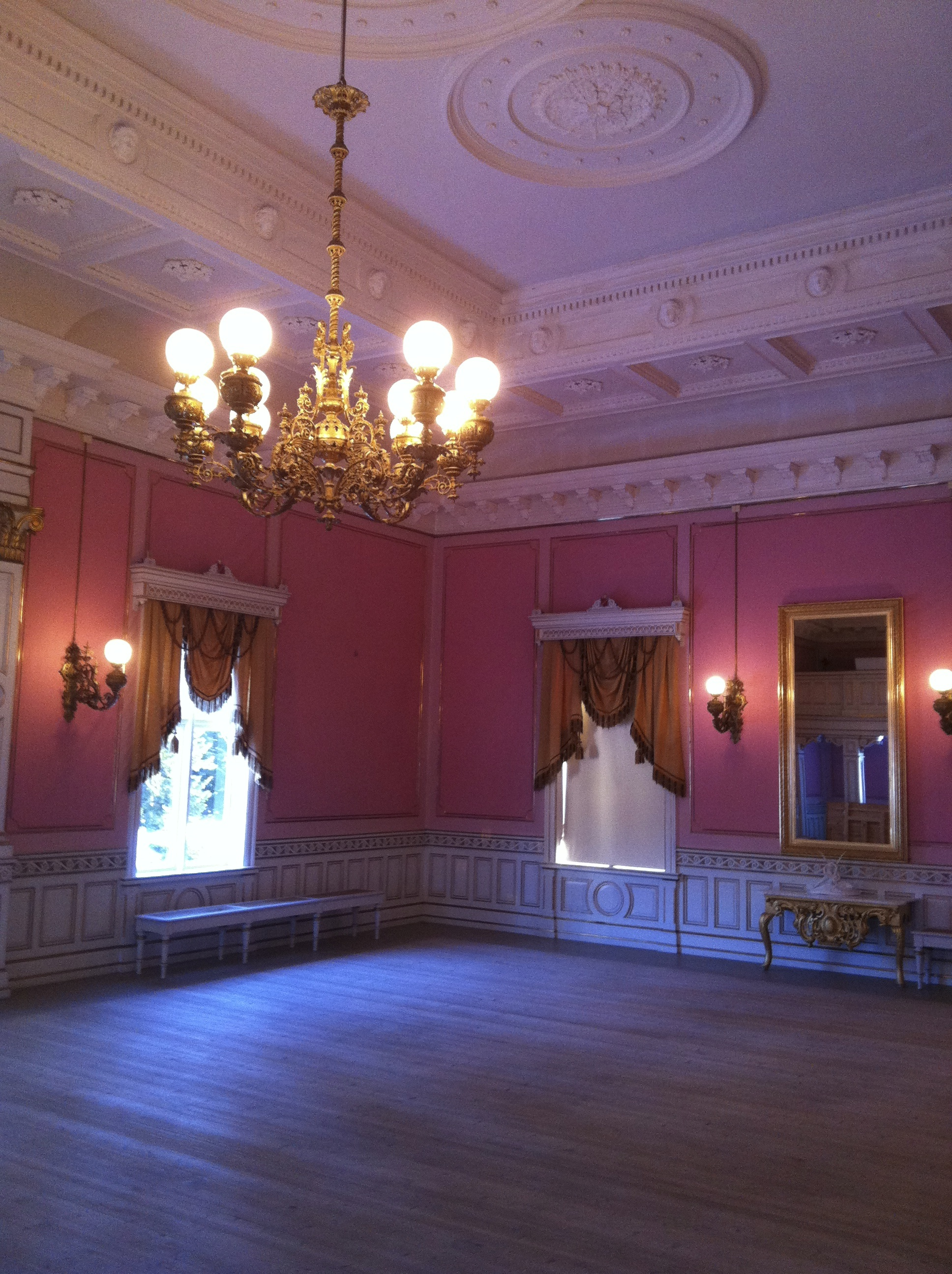 Festsalen på Melgården